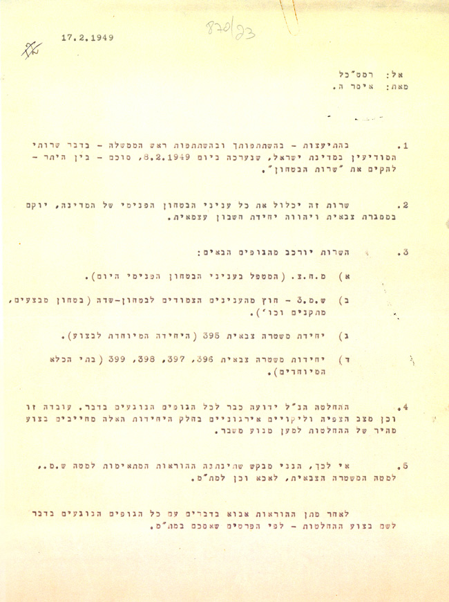 מסמך ההקמה של שירות הביטחון